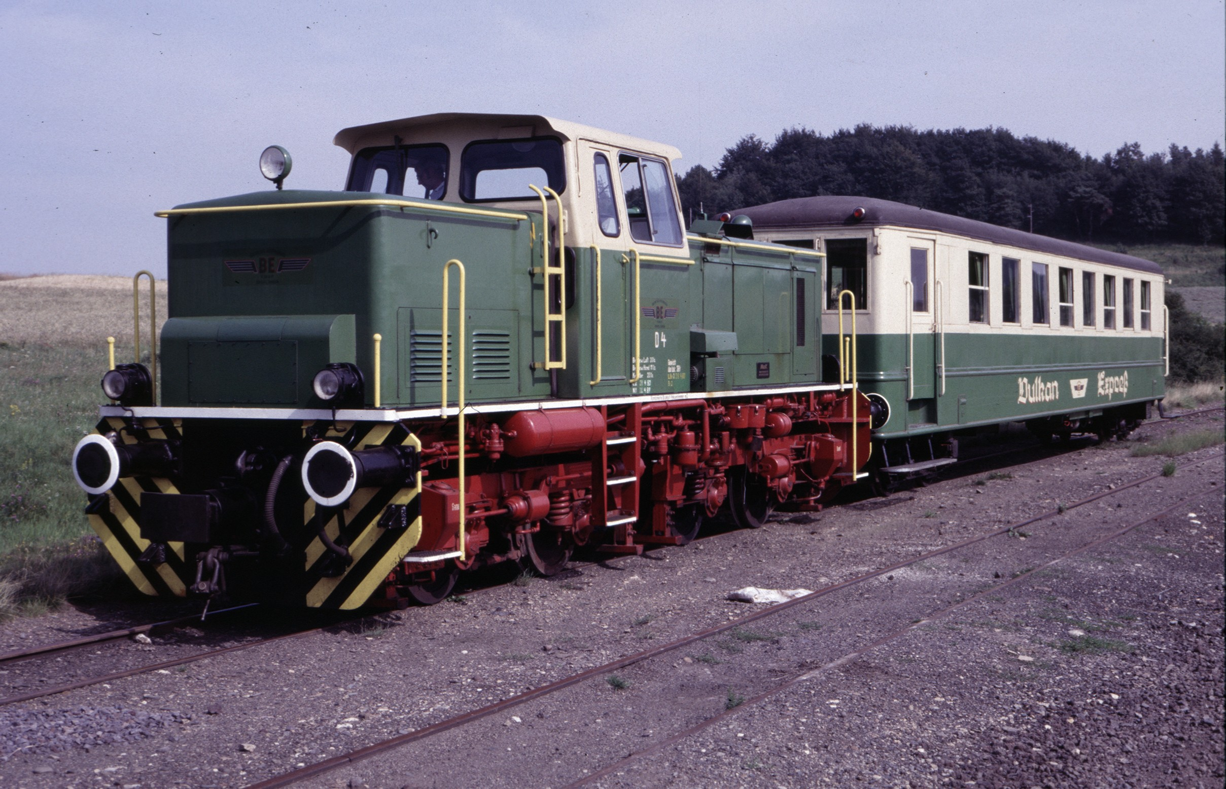 Engeln Brohltal Vulkan-Express 18.08.1984